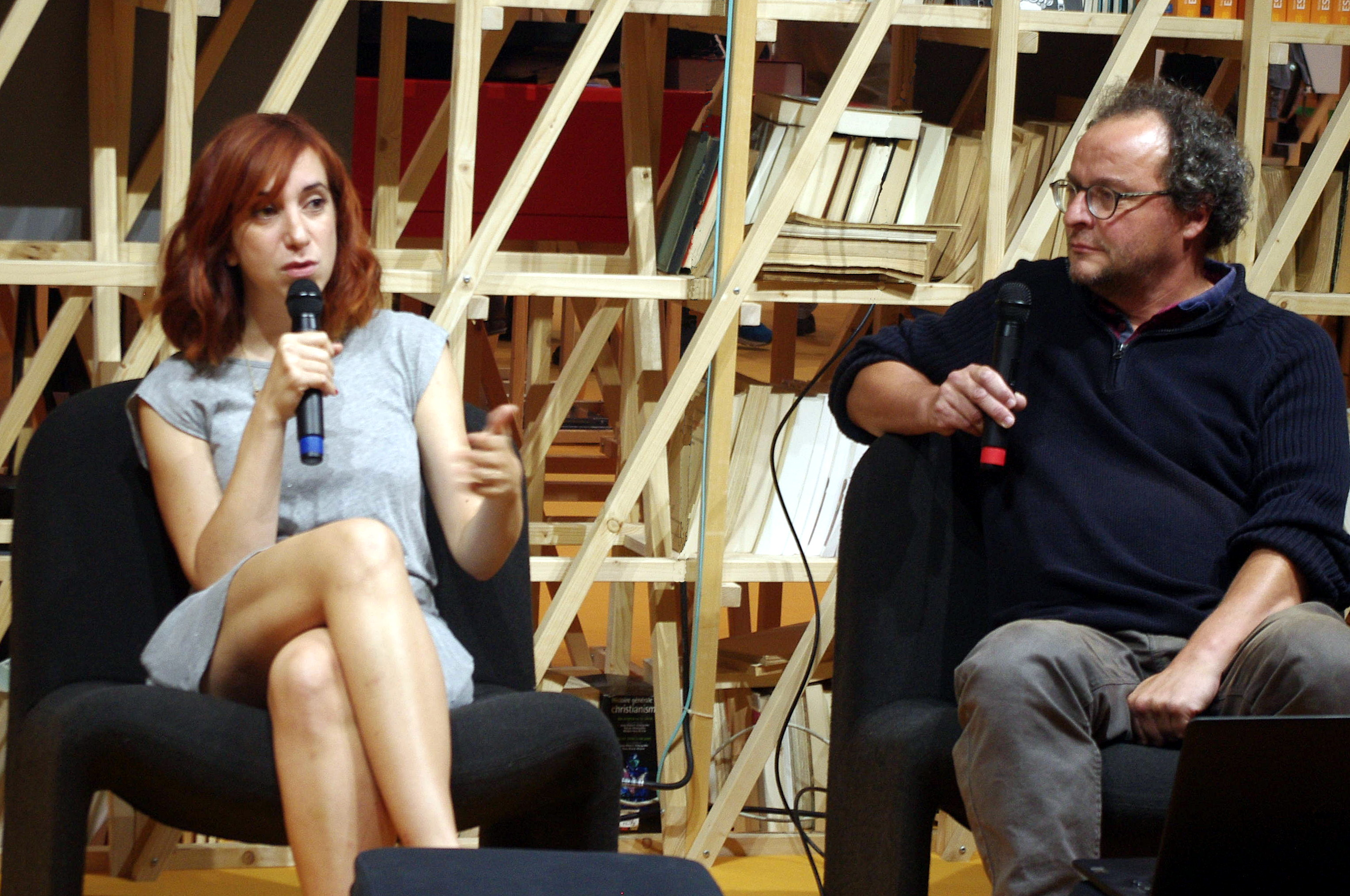 Buchmesse Frankfurt im Oktober 2017 - Penelope Bagieu im französischen Pavillon.